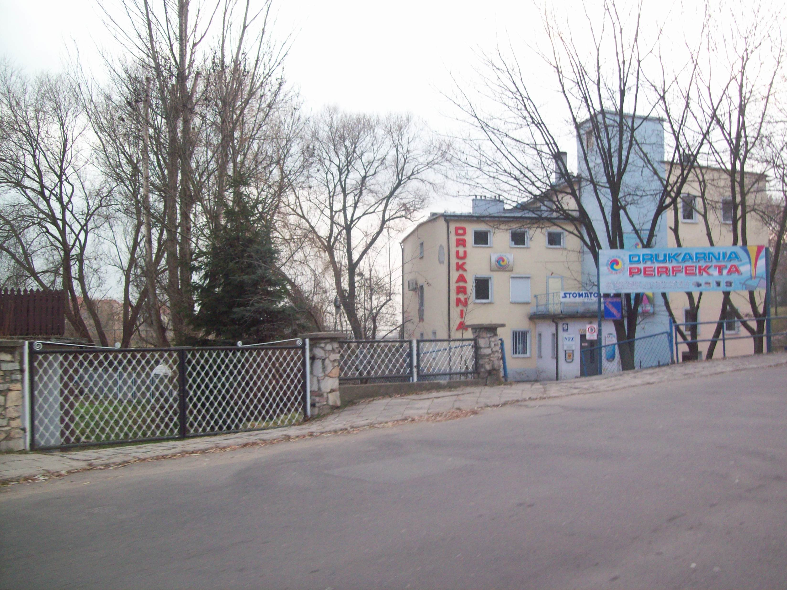 Drukarnia przy ul. Malczewskiego w Kłodzku